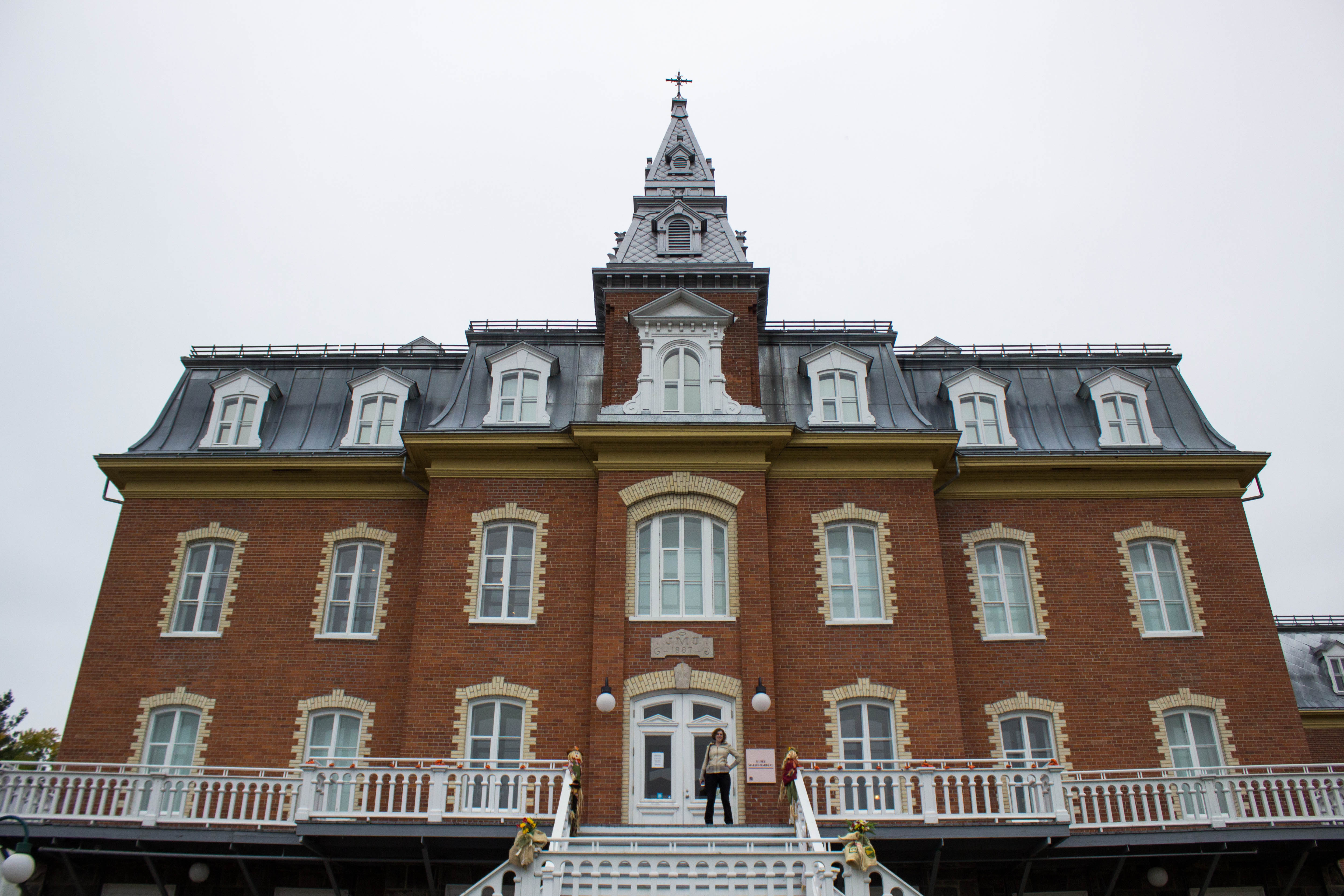 Couvent de l'ensemble institutionnel de Saint-Joseph-de-Beauce